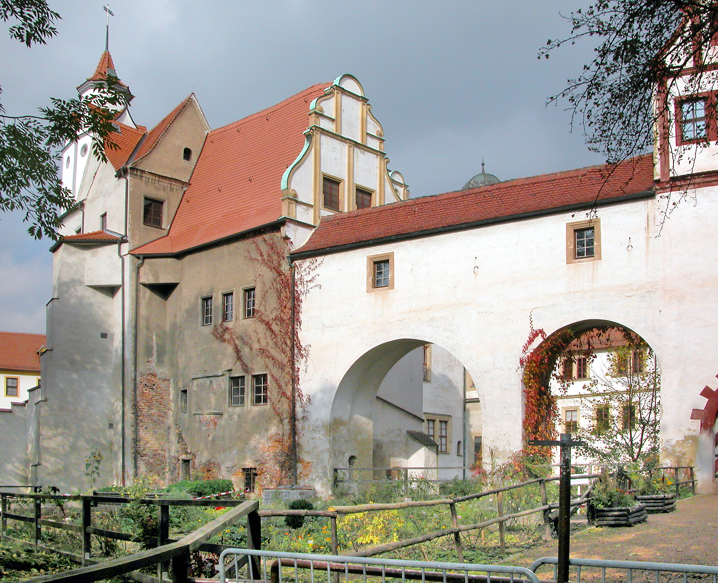 16.10.2007 08371 Glauchau, Schloßstraße 1: Schloß Hinterglauchau von Süden (links) mit der Gangbrücke nach Forderglauchau (rechts). [DSCN30782.TIF]20071016365DR.JPG(c)Blobelt